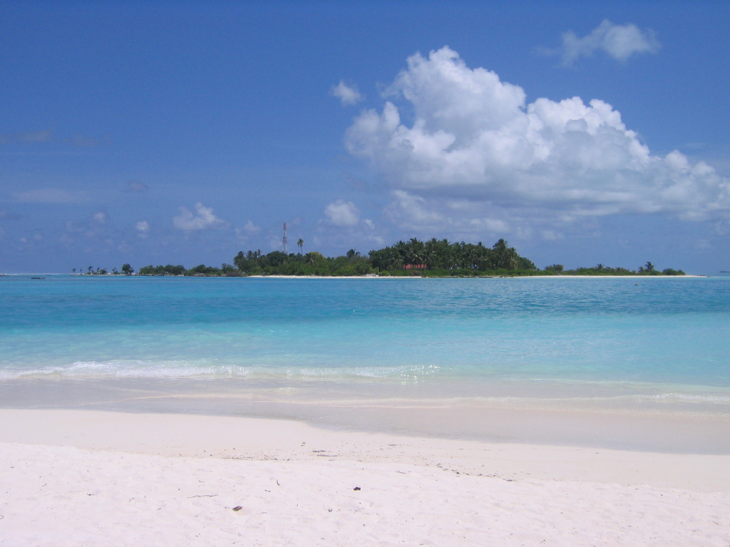 Nachbar-Insel Dhifushi bei Meeru im Nord Male´Atoll